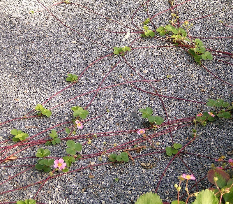 Fragaria × ananassa (Fragaria virginiana × Fragaria chiloensis) × Comarum palustre 'Pink Panda'